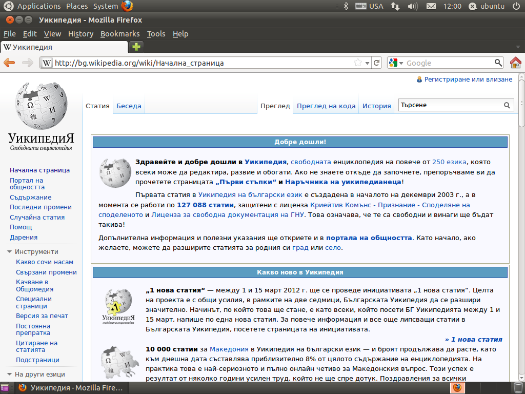 Вградената в Ubuntu 11.04 Firefox (4.0) показва началната страница на Уикипедия